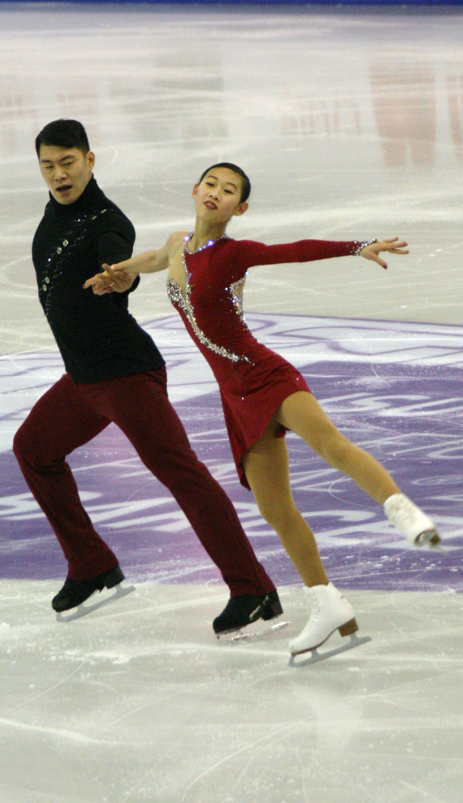 Пэн Чэн и Чжан Хао (Китай) на финале Гран-при по фигурному катанию 2015-2016.